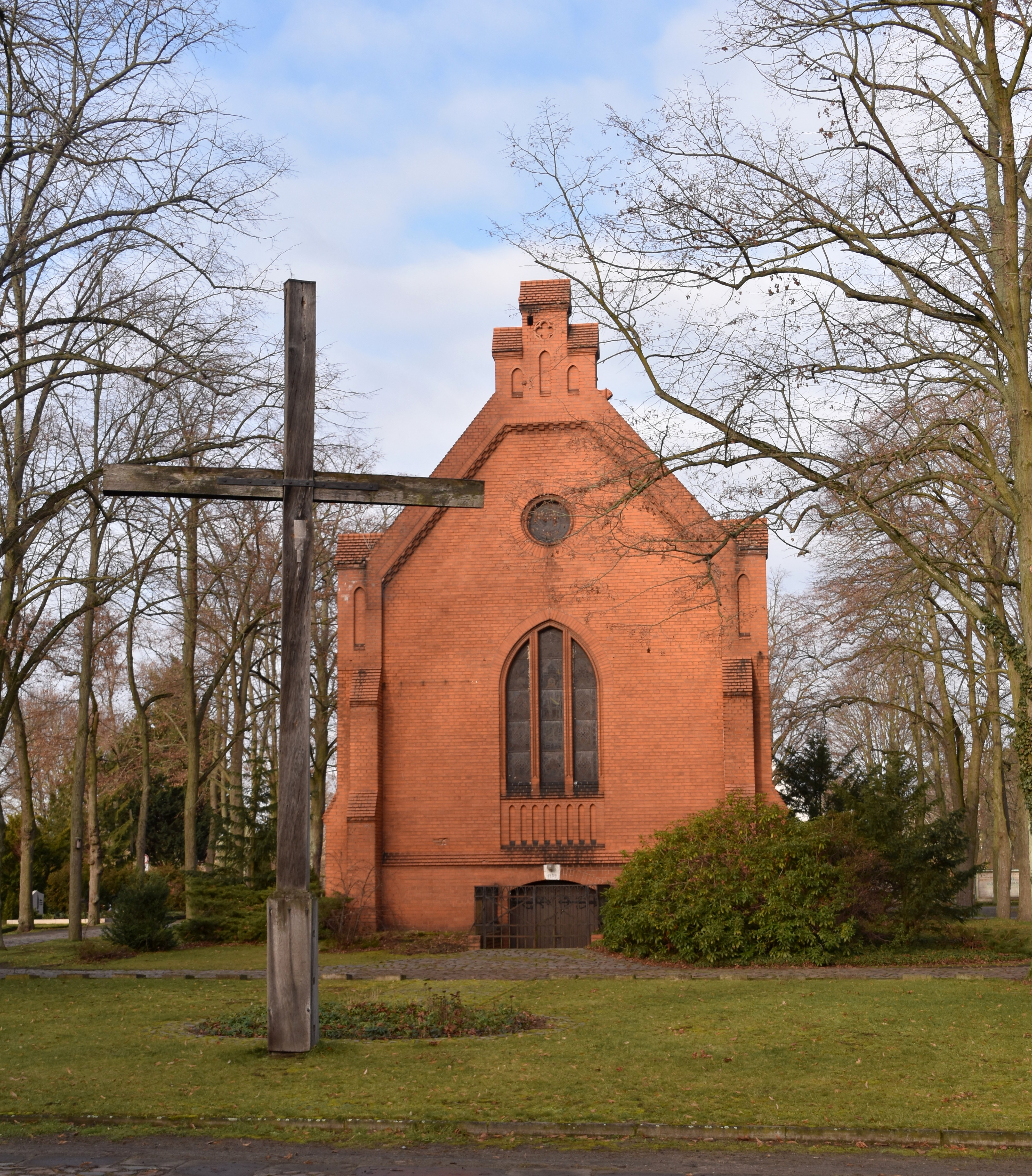 Friedhofskapelle auf dem Friedhof Genthin